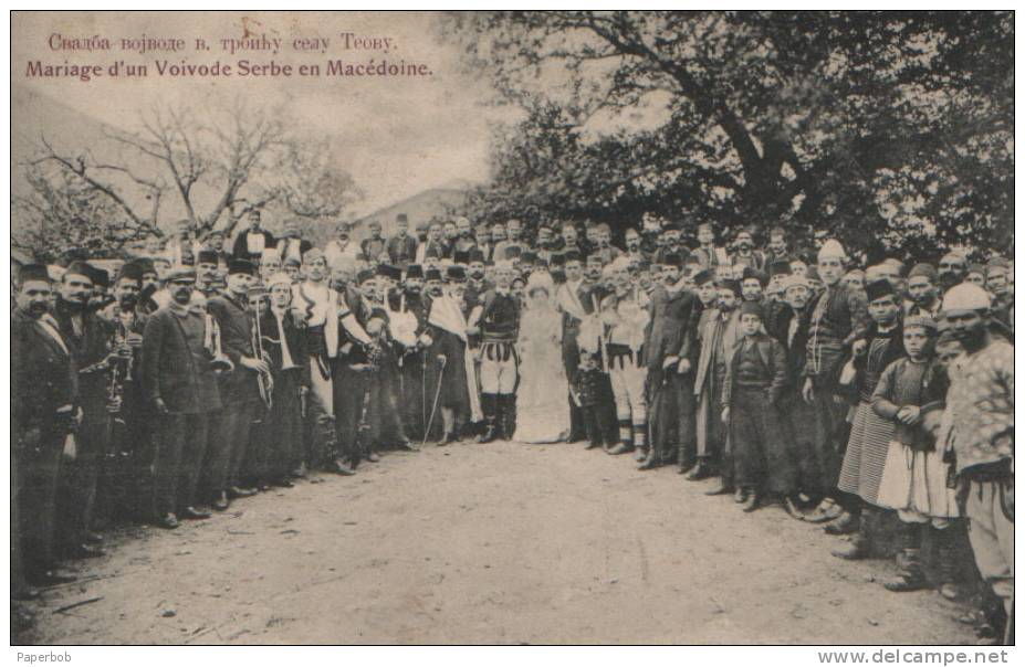 Serbian Chetnik Vasilije Trbić's wedding in Teovo